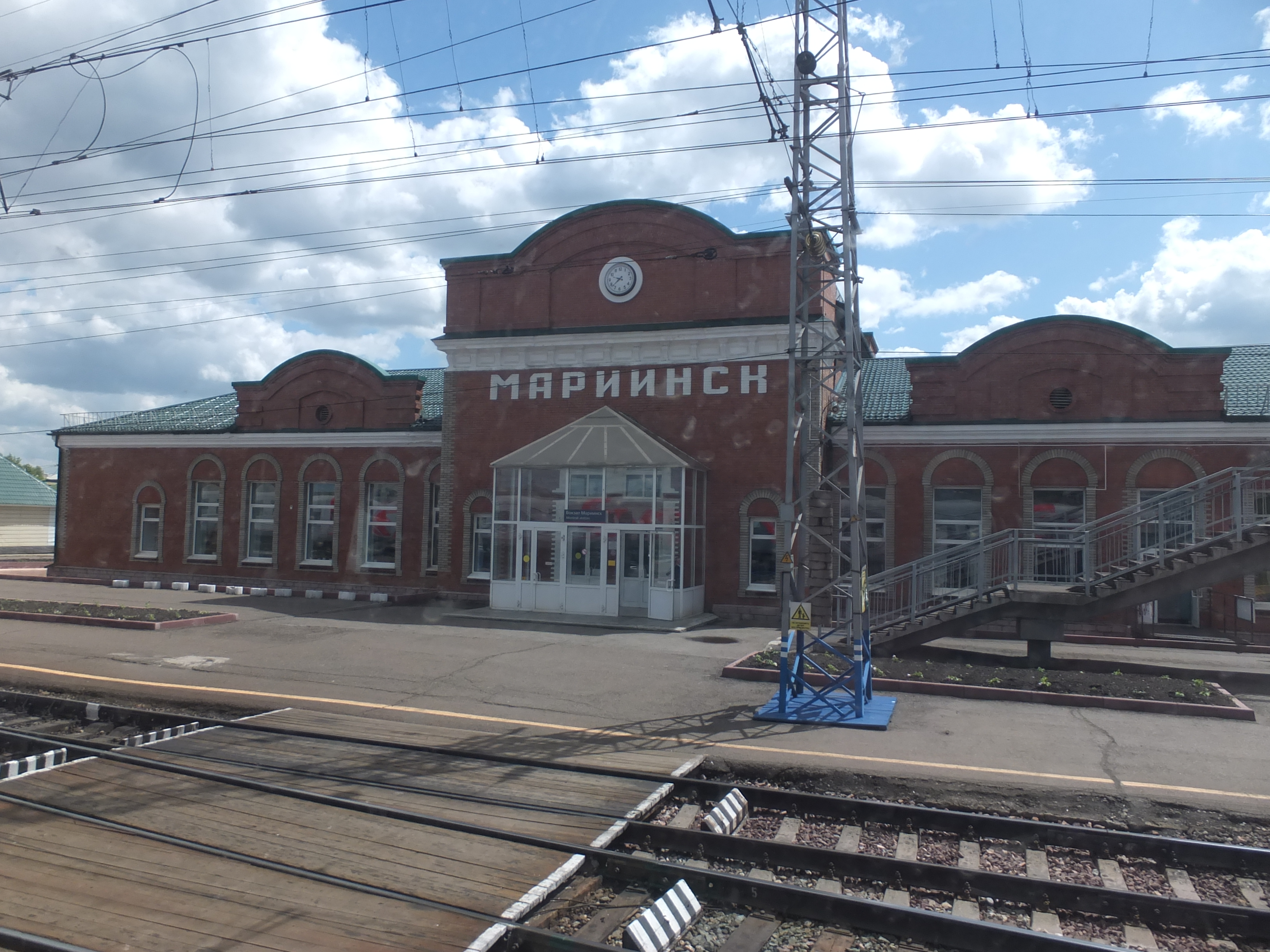 Bahnhof Mariinsk (Streckenkilometer 3702 der Transsibirischen Eisenbahn)